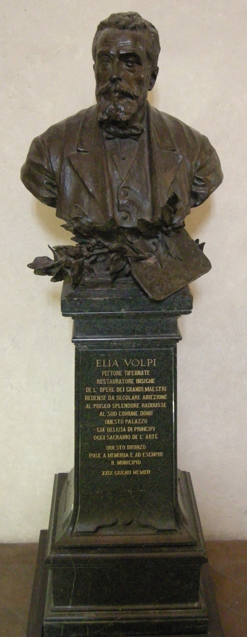 Elmo Palazzi, busto di Elia Volpi, palazzo Vitelli alla Cannoniera